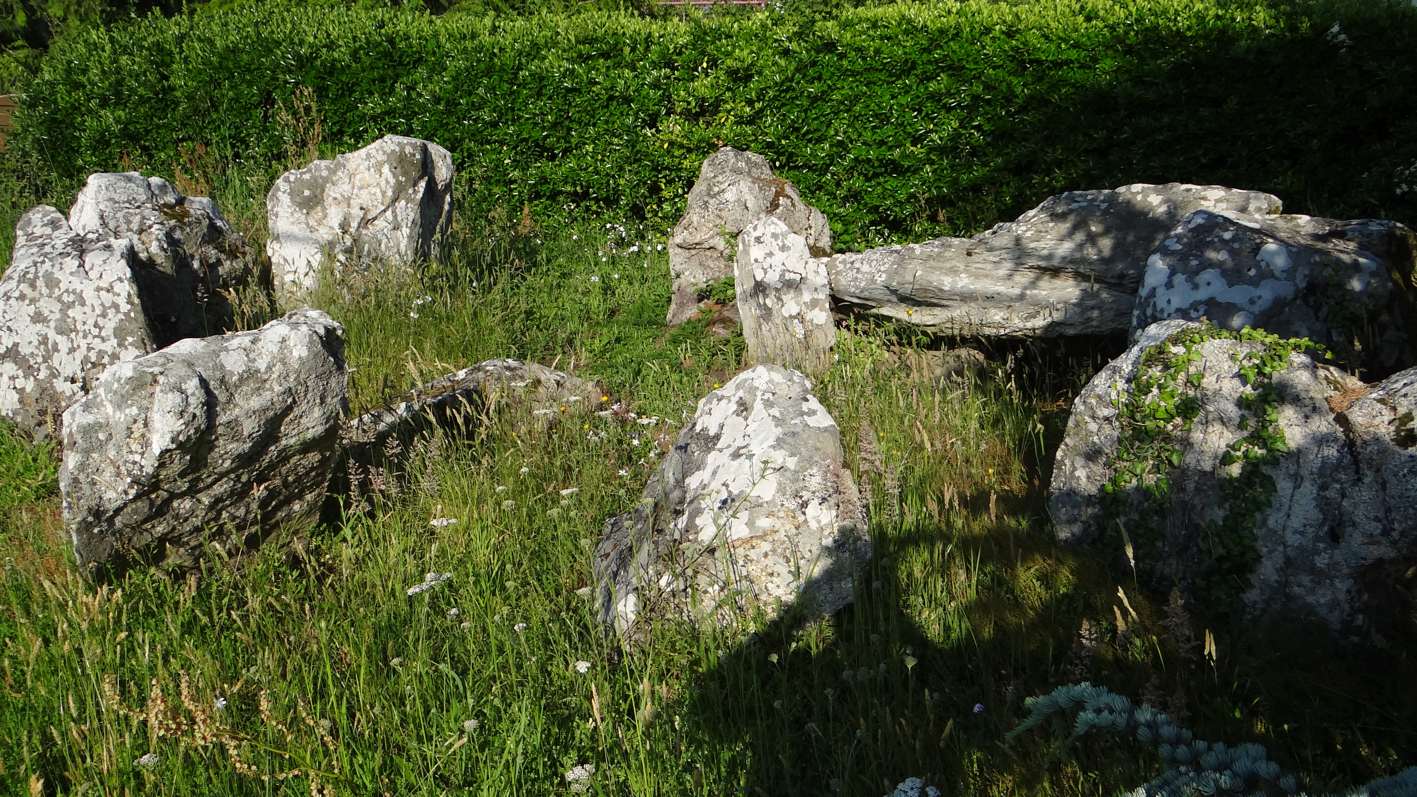 Saint-Nazaire le cromlech